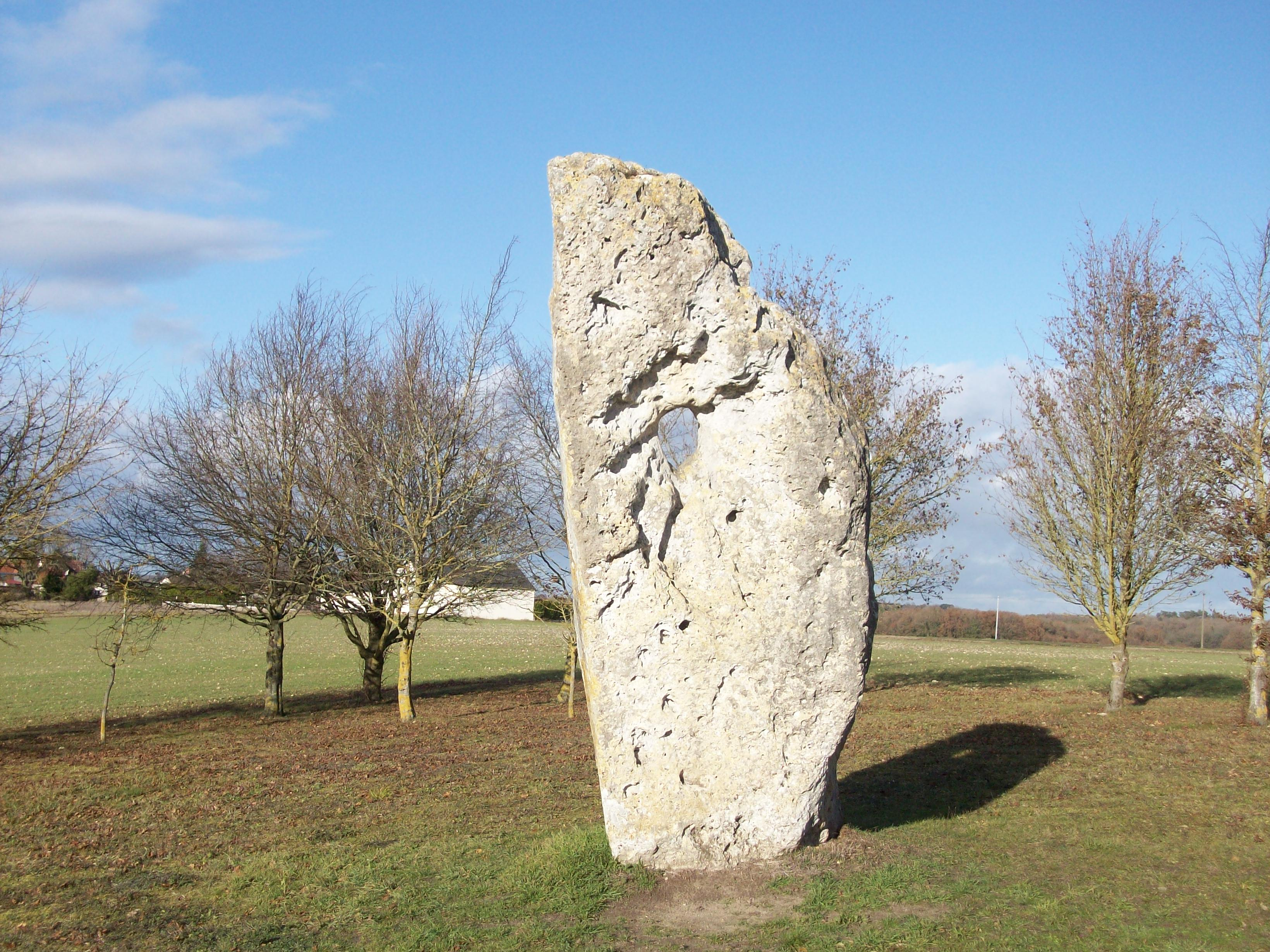 Monument mégalithique situé à Draché (France)